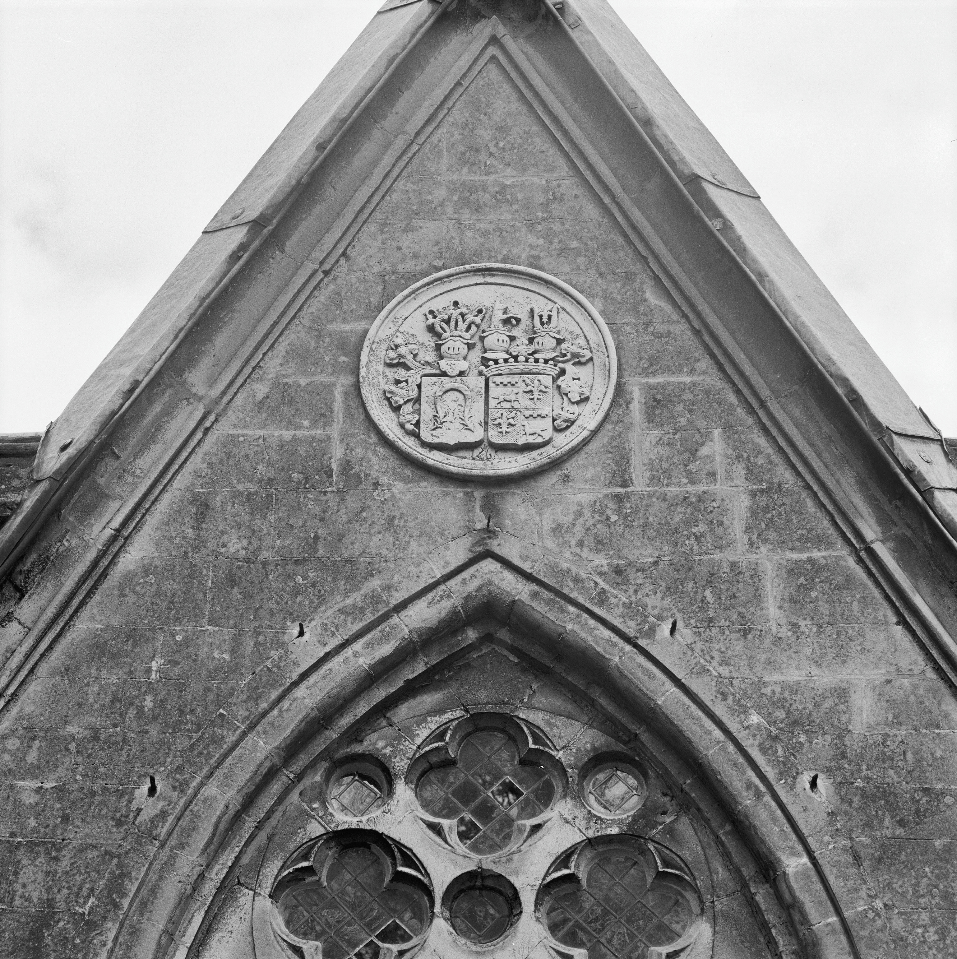 Rooms-Katholieke Kerkhof: Exterieur GRAFKAPEL, WAPENSTEEN (FAM. DE LOë)